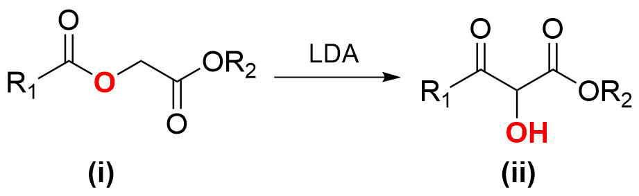 Rearranjo do acetato de aciloxi em 2-hidroxi-3-ceto-éster através do LDA